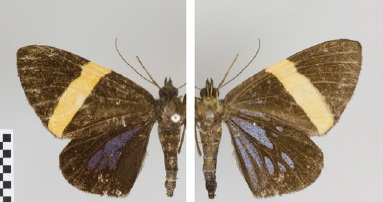 Hagnagora catagrammina